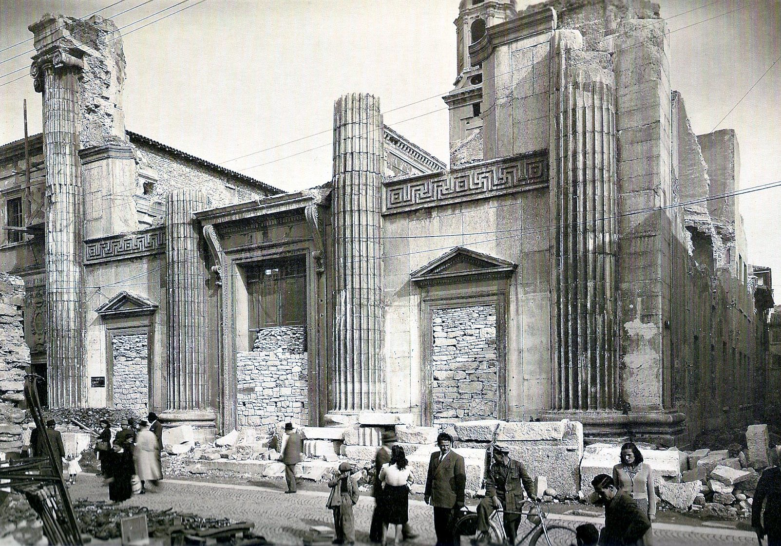 La chiesa di San Sebastiano alla fine della seconda guerra mondiale